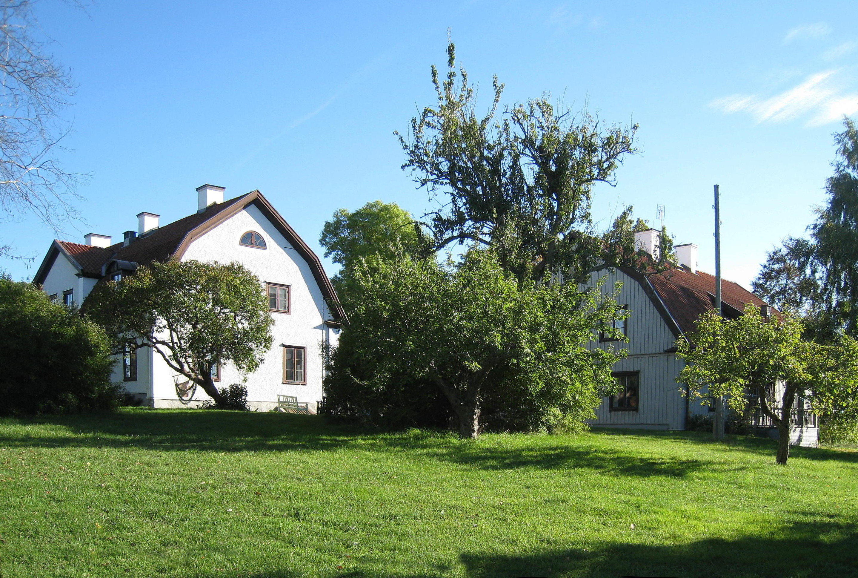 Viksjö gård, Järfälla kommun, västra flygeln, vy från nordväst med mangårdsbyggnaden till vänster och västra flygeln till höger i bild.